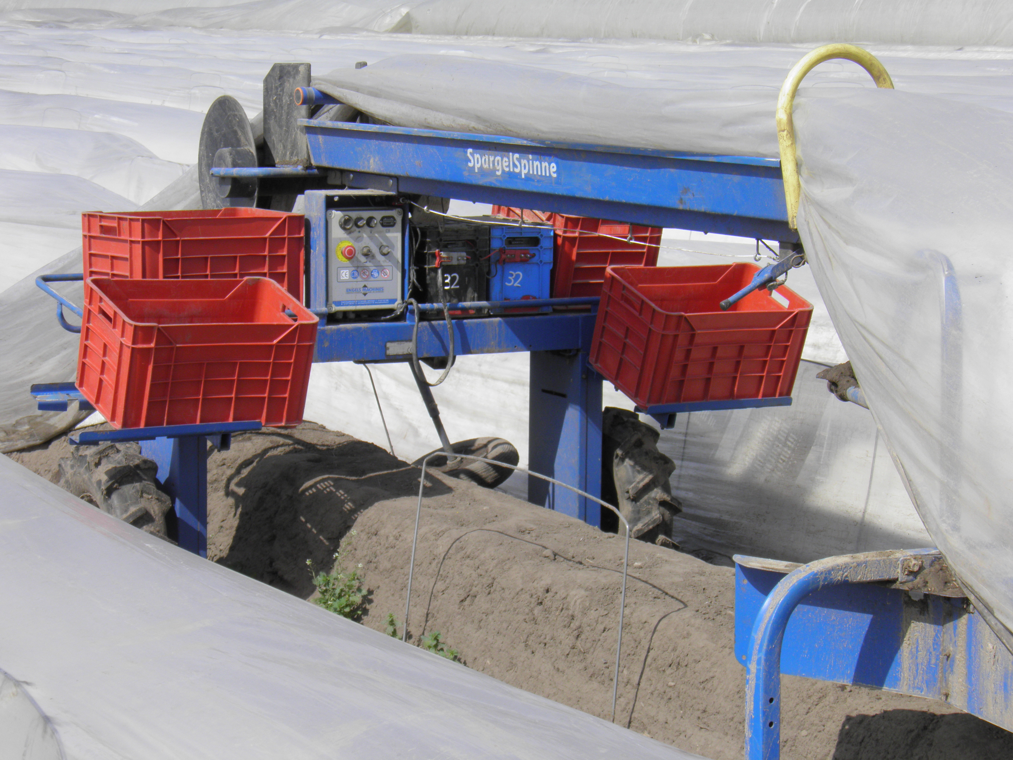 Erntemaschine auf einem Spargelfeld